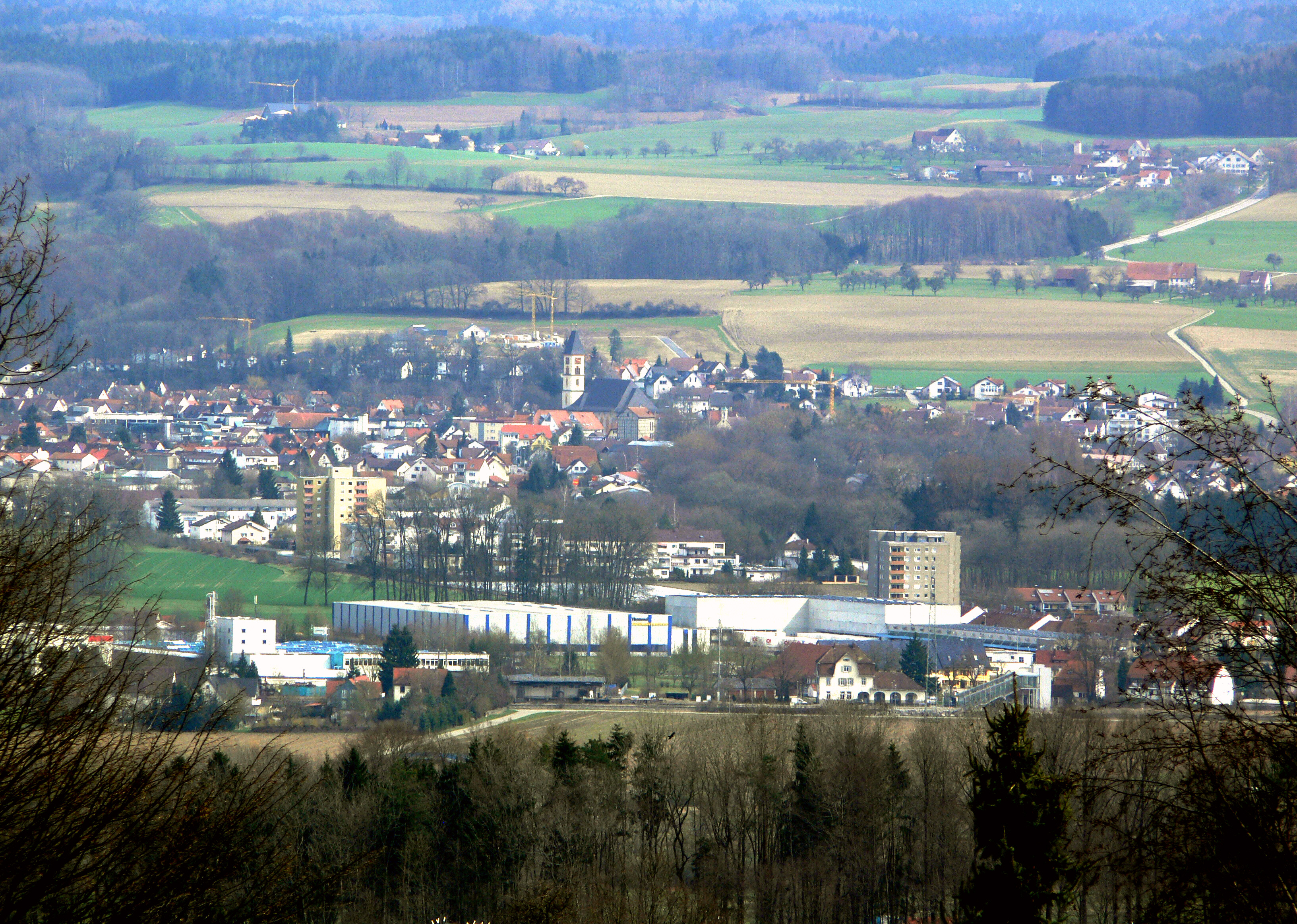 Baienfurt im Schussental, Blick von Westen (Gde. Berg), im Vordergrund der Bahnhof Niederbiegen